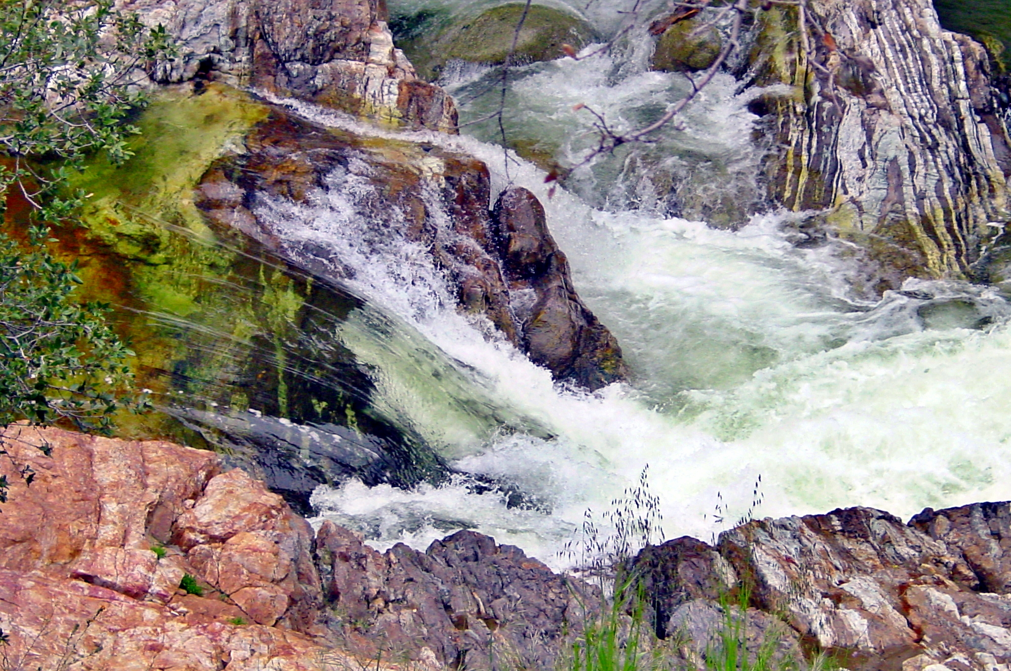 La rivière Kaweah qui longe la CA 198, conté de Tulare, étta de la Californie, États Unis d'Amérique.